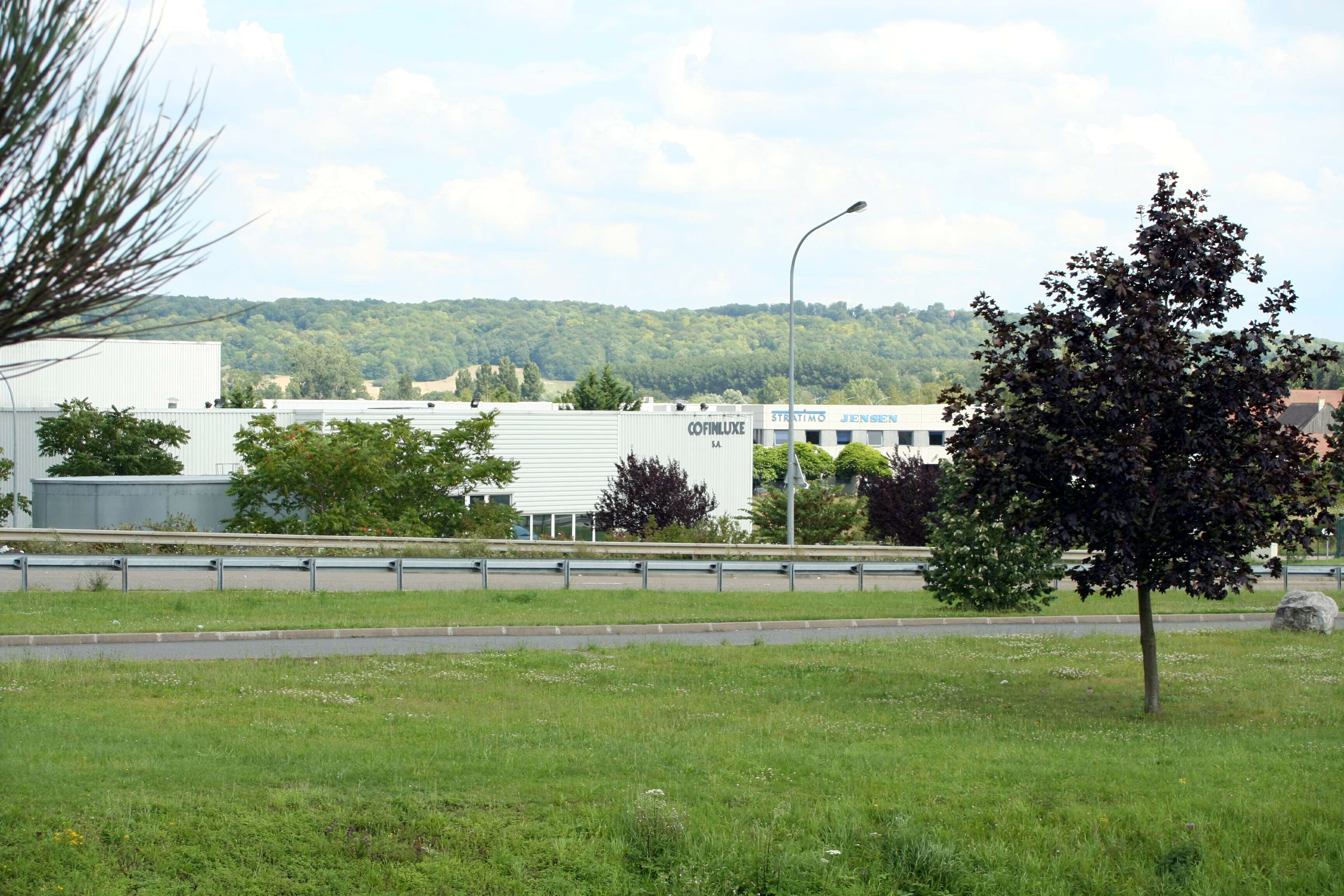 Zone industrielle de la Couronne des prés (vue partielle) à Épône, Yvelines (France)